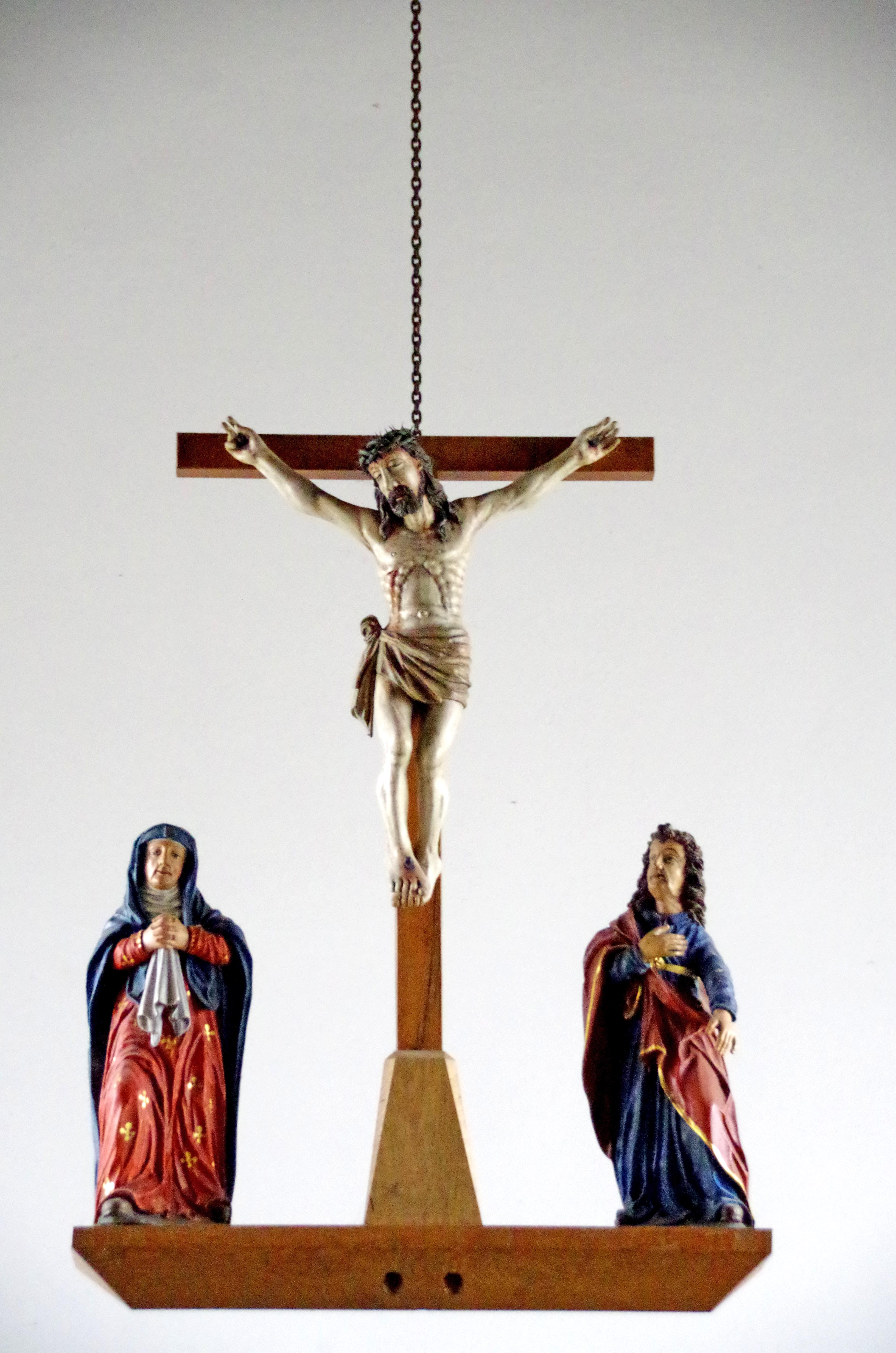 St. Peter (Zingsheim), Kreuzigungsgruppe (15.Jh.)